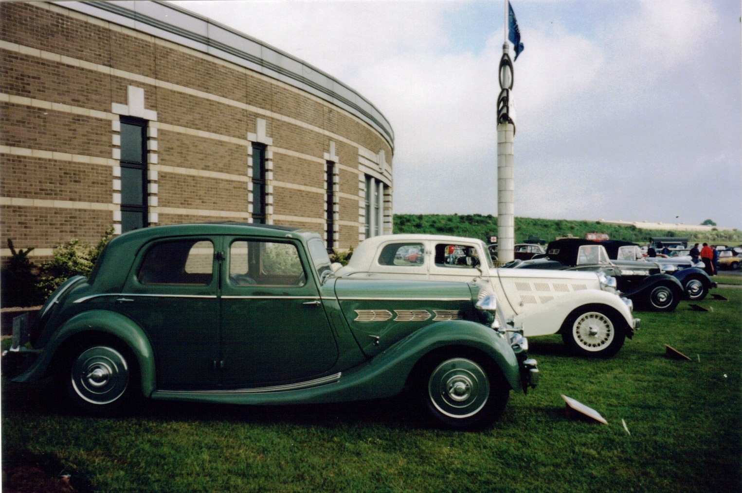 Triumph Dolomite (green) and Vitesse (cream) Saloons, 1936-1938. Foto in England